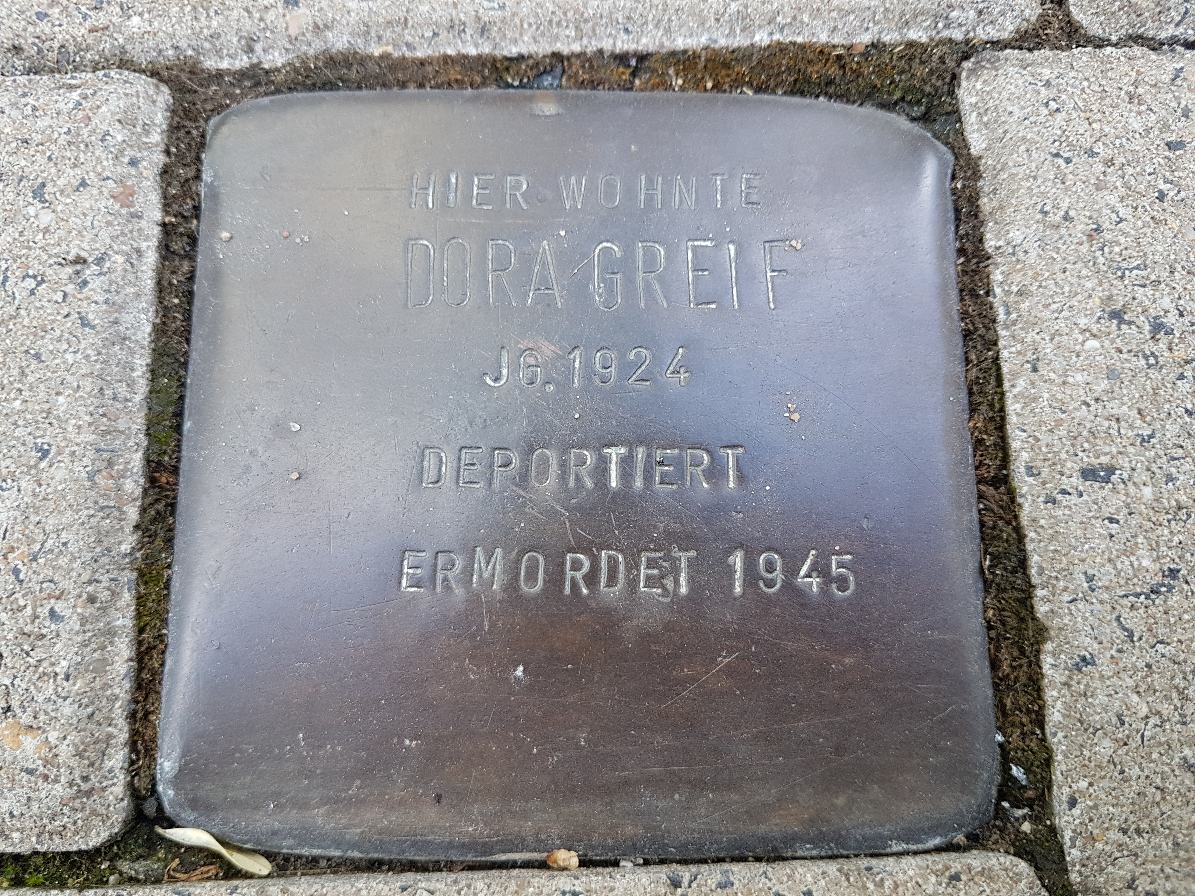 Stolperstein Duisburg Dora Greif